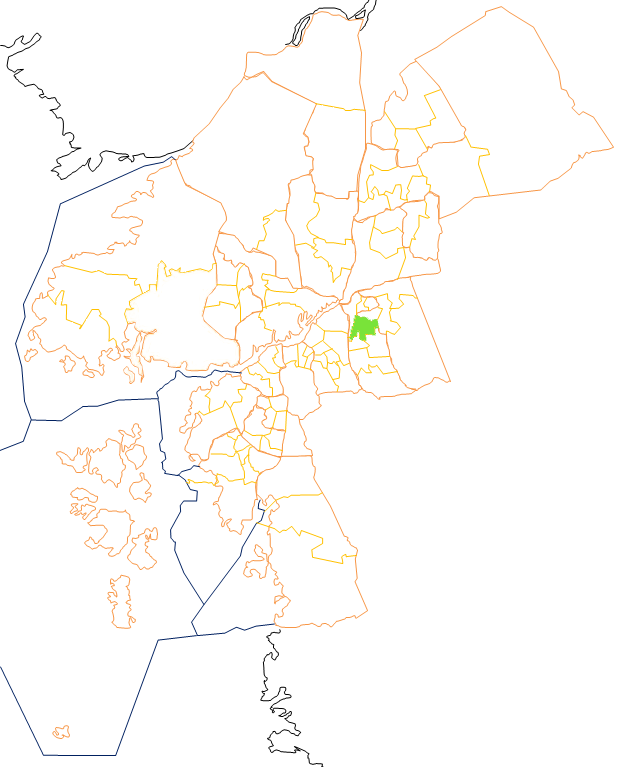 Karta som visar primärområdes belägenhet i Göteborg